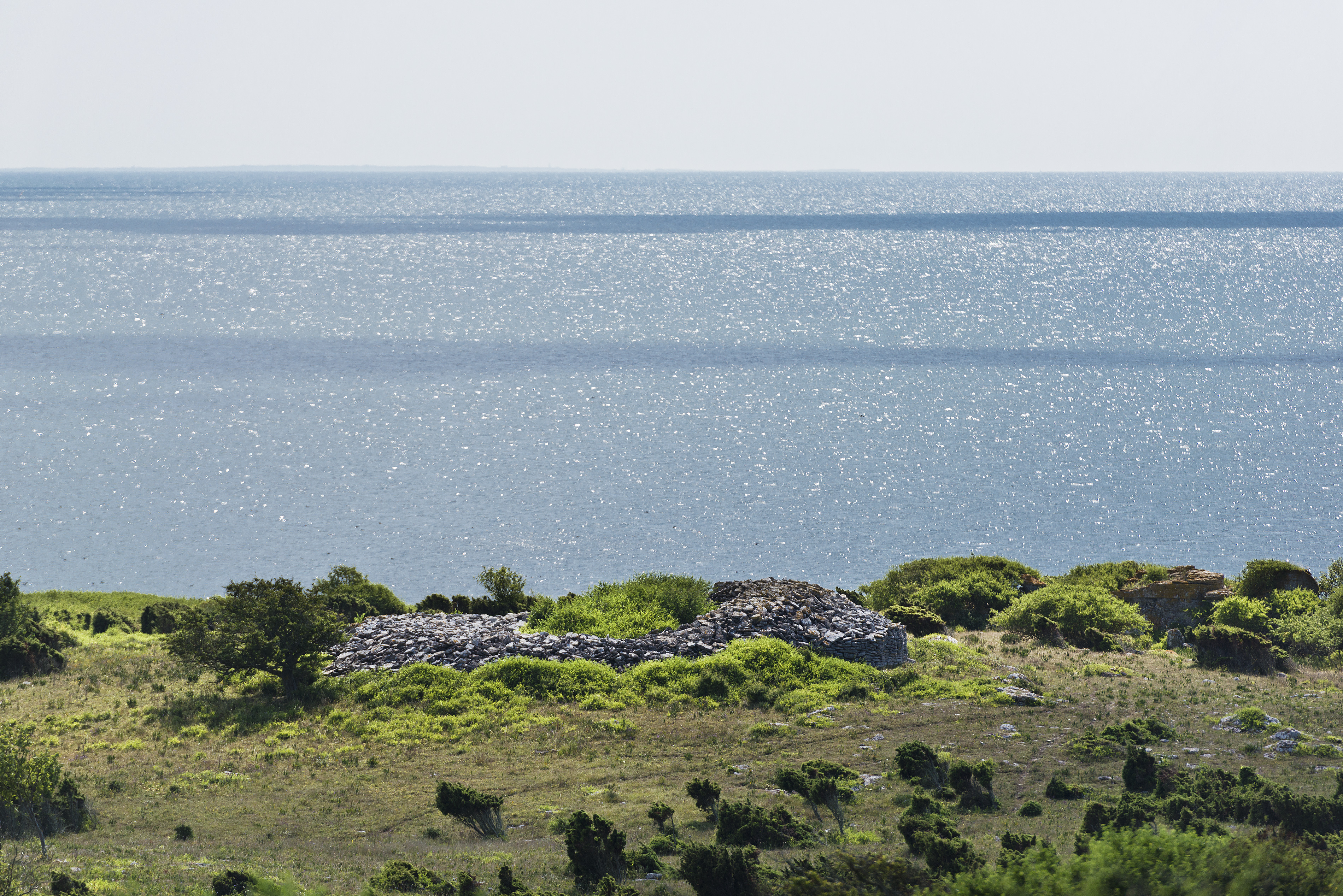 Cairn - Lauphargi